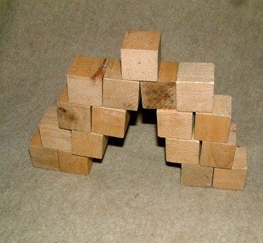 Kragbogen 3: Die Struktur ist so instabil, dass sie als Bogen kaum ihr eigenes Gewicht tragen kann.